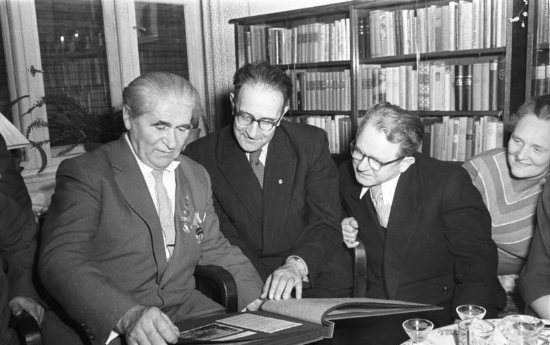 Zentralbild-Zühlsdorf 30.12.1957 Zum 70. Geburtstag von Robert Siewert Zu seinem 70. Geburtstag wurde Robert Siewert, Leiter des Sekretariats für Örtliche Wirtschaft im Ministerium für Aufbau, am 30. Dezember 1957 mit dem Orden "Banner der Arbeit" ausgezeichnet. Aus dem gleichen Anlaß hat der Präsident des Nationalrats der Nationalen Front, Prof. Dr. Dr. h.c. Correns, dem Arbeiterveteranen Robert Siewert die Ernst-Moritz-Arndt-Medaille verliehen. UBz.: Robert Siewert tauscht mit seinen Geburtstagsgästen Kampferinnerungen aus. (Von links:) Robert Siewert, Stephen Heymann und Walter Bartels.